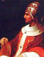 Gregorius XI